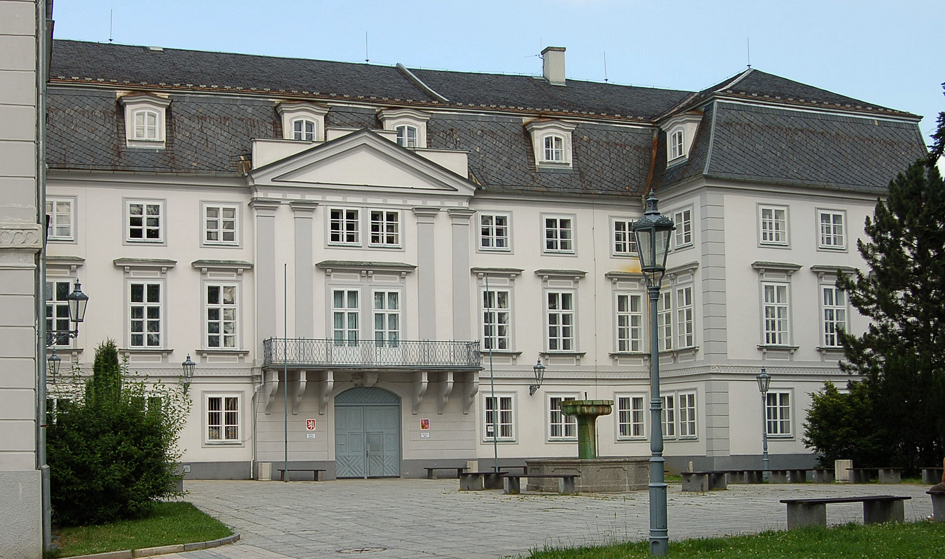 Zámek v Tachově